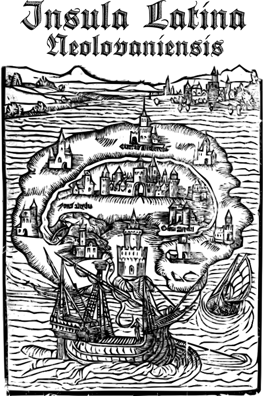 Logo de l'insula latina neolovaniensis.